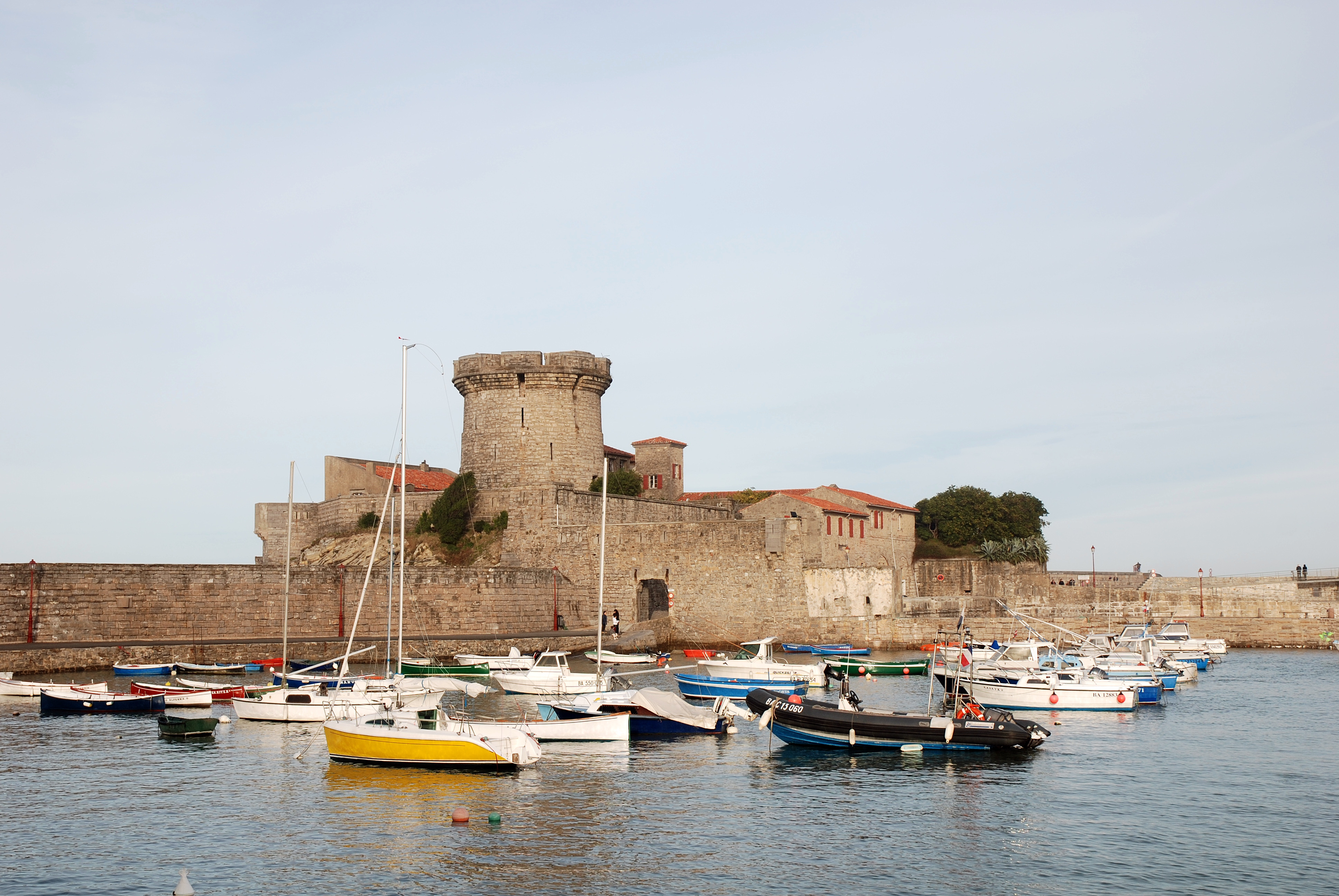 Ciboure (Pyrénées-Atlantiques) : le fort de Socoa. Photo prise le 03/01/07 par Harrieta171